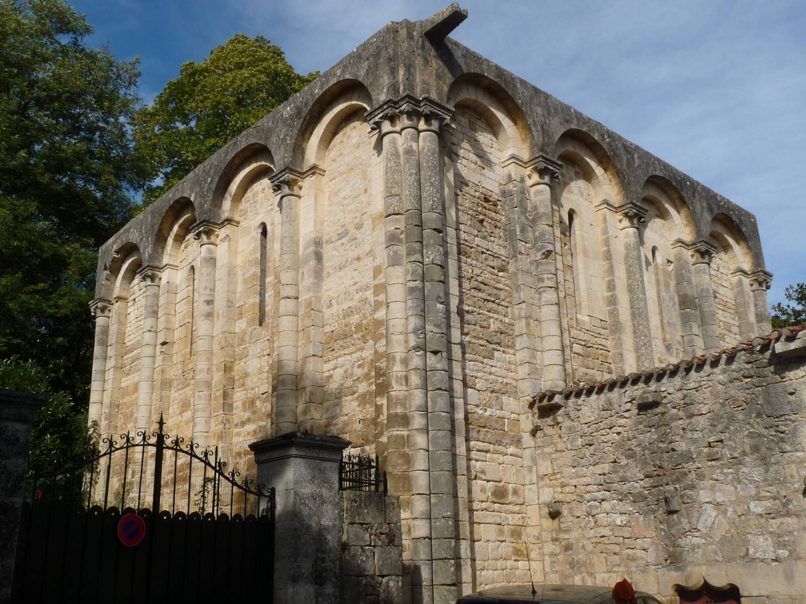 ancienne abbaye de Nanteuil-en-Vallée, Charente, France; Salle du Trésor, à l'entrée sud